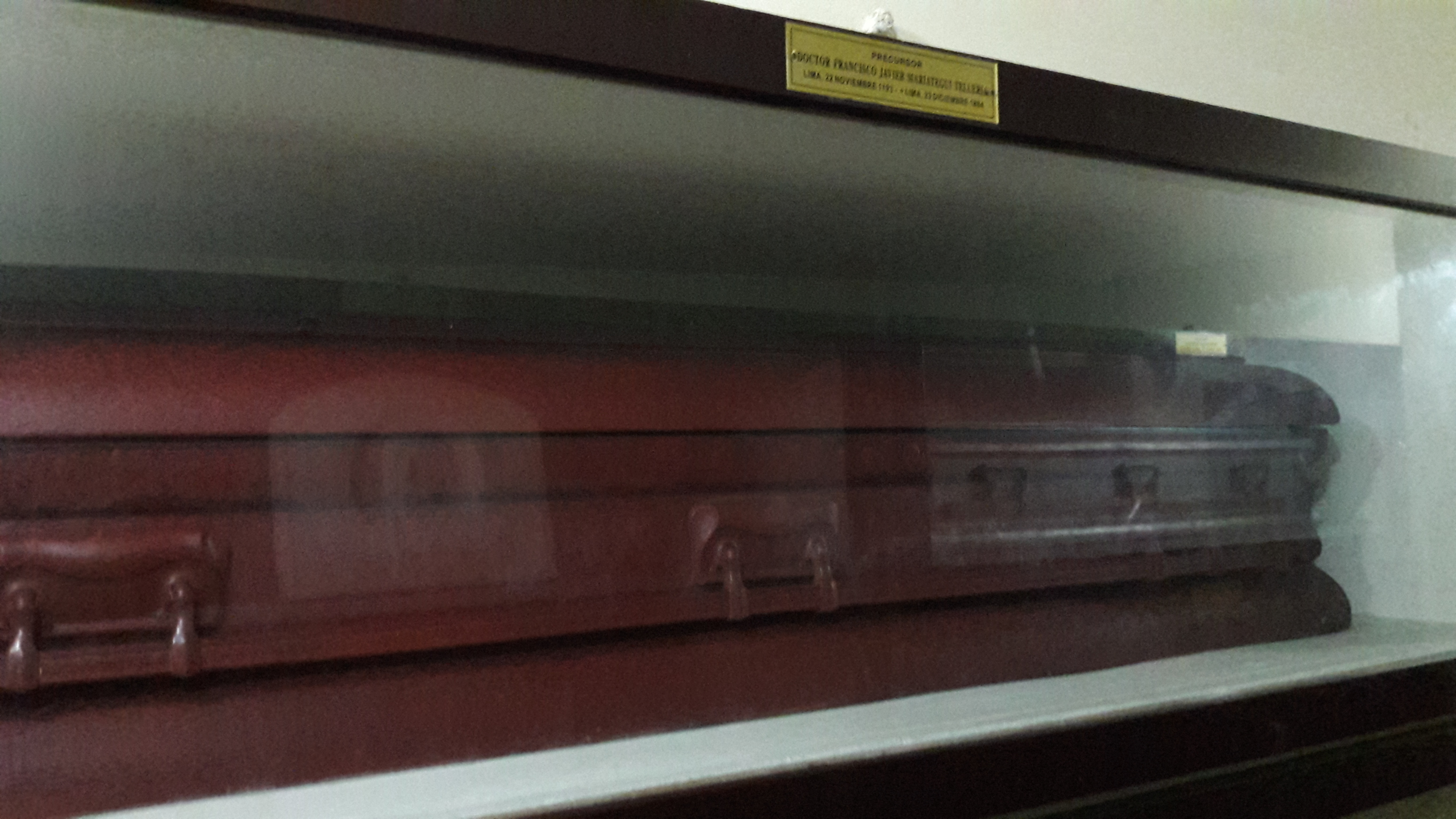 Tumba de Francisco Javier Mariátegui y Tellería